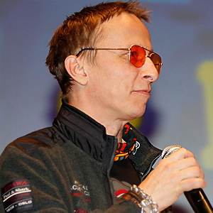 Иван Охлобыстин на премьере мультфильма «Снежная Королева» 23 декабря 2012 года.